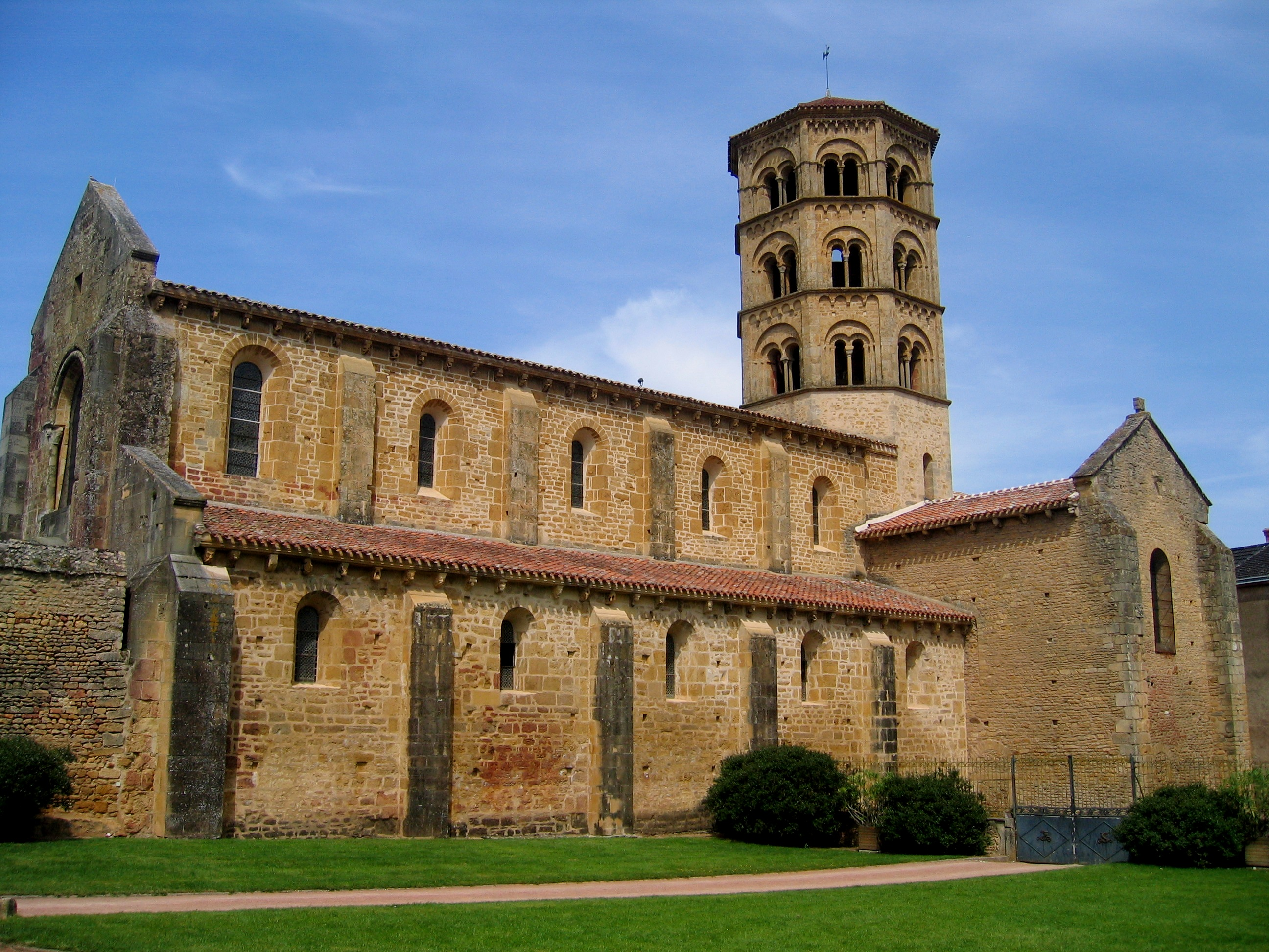 Bourgogne Anzy Le Duc Saint-Laurent 09052011